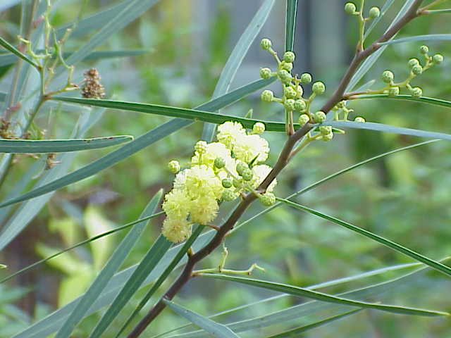 Species: Acacia melanoxylon Acacia retinodes Family: Mimosaceae Image No. 3